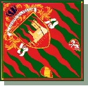 Bandiera della Contrada Castello della città di Piancastagnaio (dal 1999)